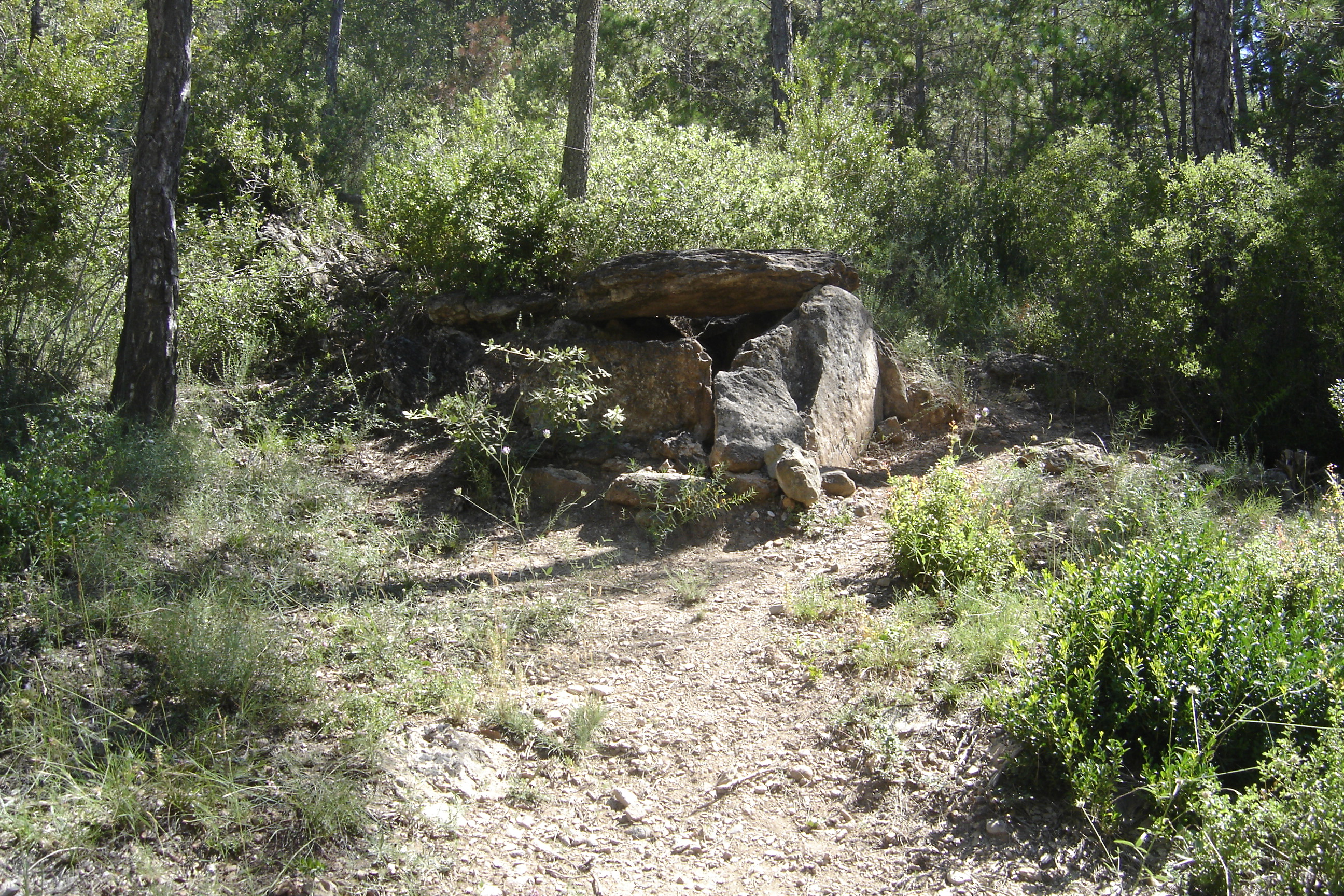 Una de les 3 tombes de la necòpolis de Ceuró (Castellar de la Ribera) (Solsonès)